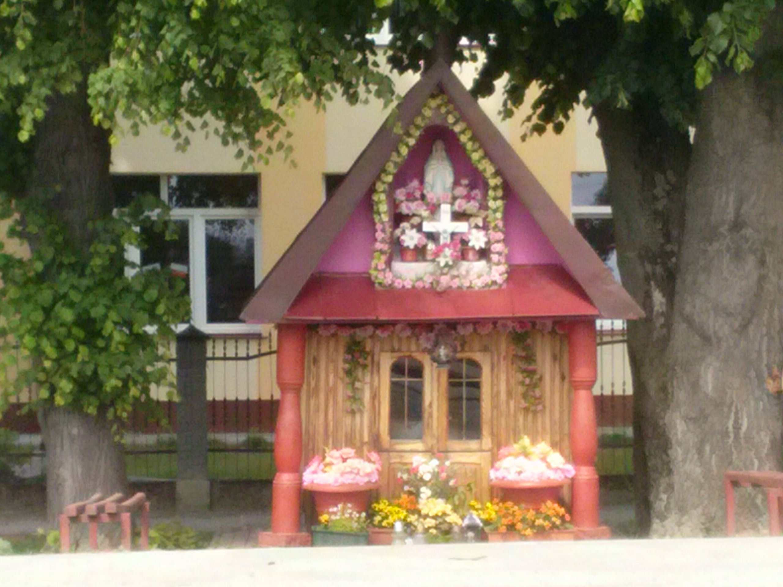 Kapliczka w Ubieszynie z XIX wieku